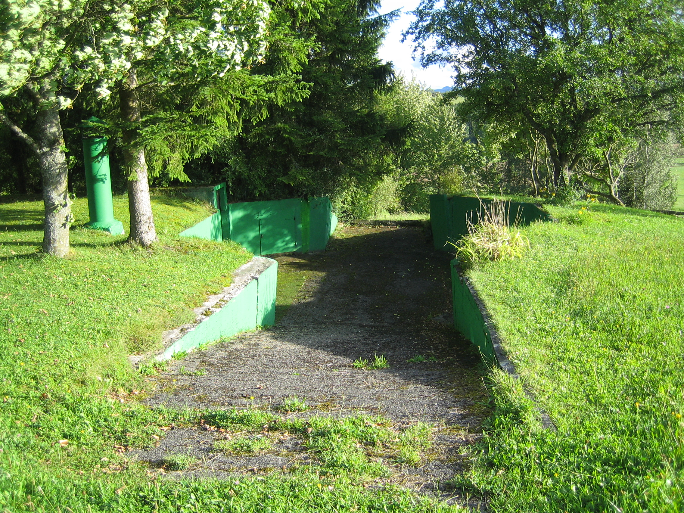 LVZ West Geschuetzbettung in Feckenhausen bei Rottweil